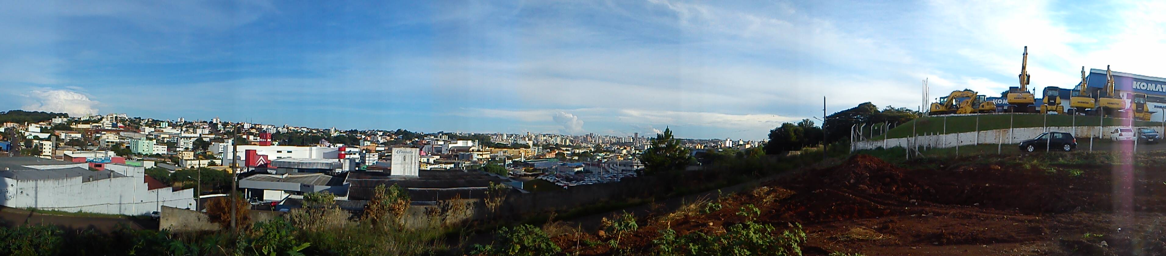 Panorâmica parcial de Chapecó 2014